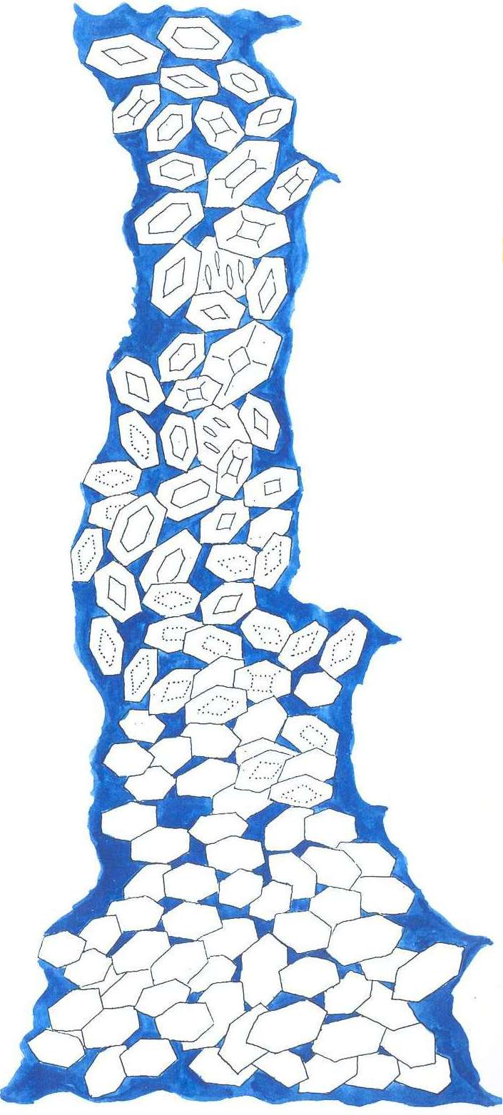 A nakhlitos láva egy oszlopa, az egymáson támaszkodó piroxén kristályokkal.